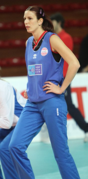 Jelena Nikolić, pallavolista serba, gioca nel ruolo di schiacciatrice